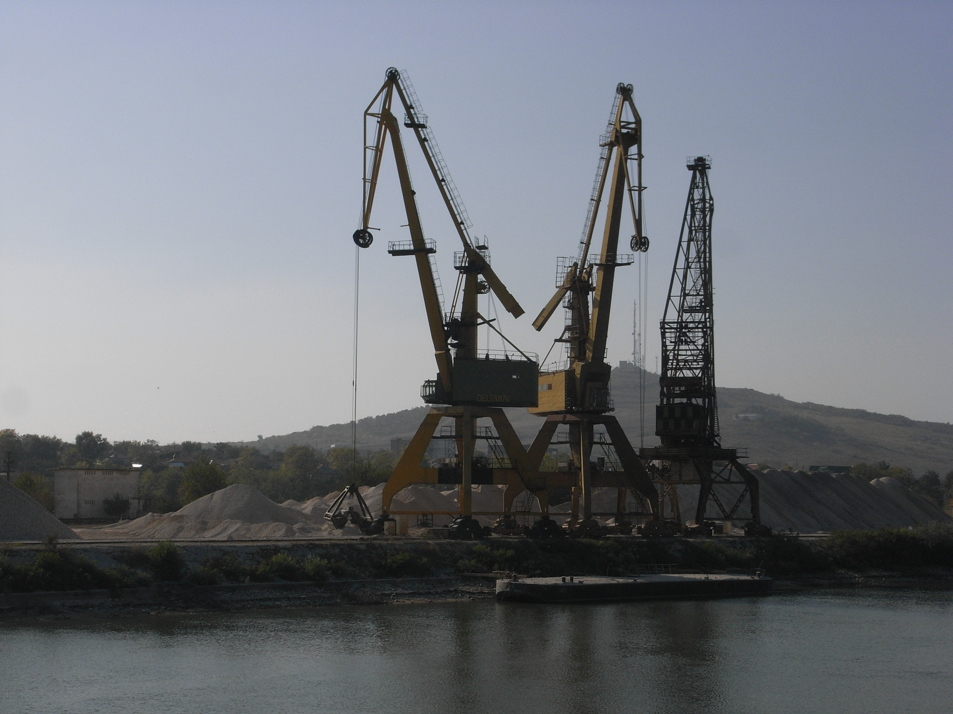 Mahmudia